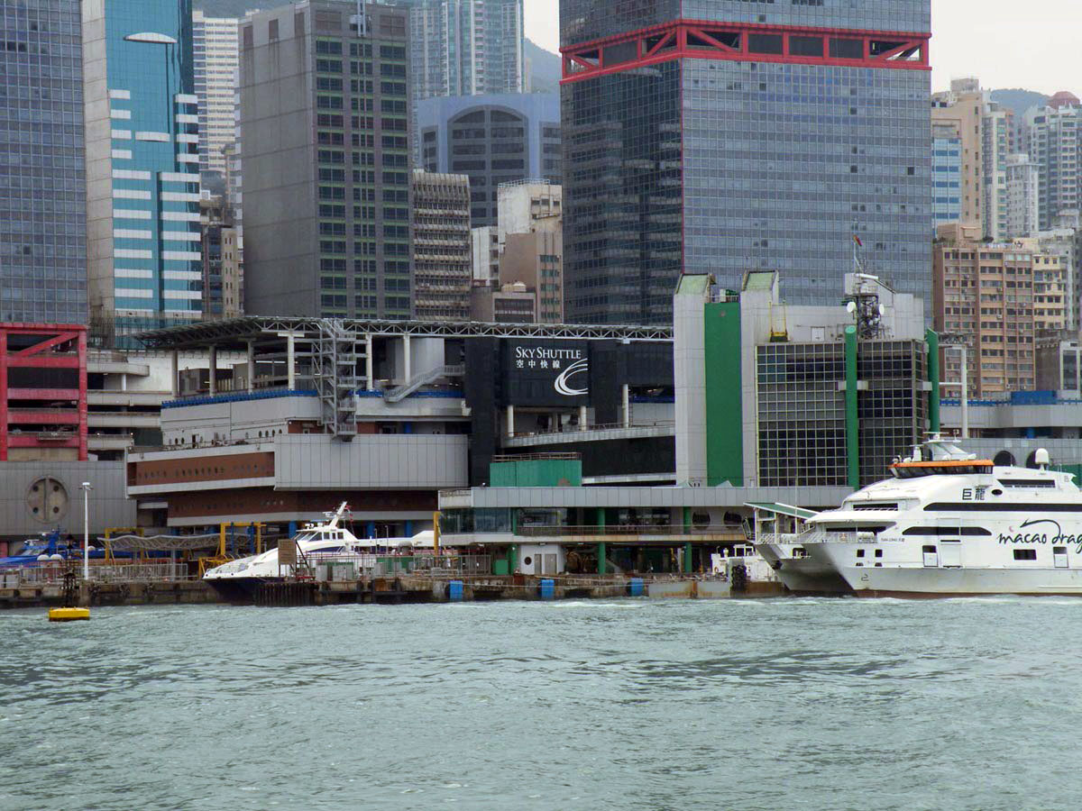 Shun Tak Heliport